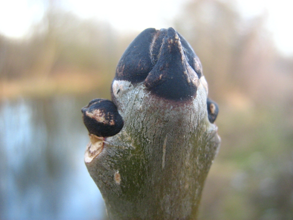 Knospen der Gemeinen Esche - Fraxinus excelsior, fotographiert an der Havel in Oranienburg (Brandenburg).